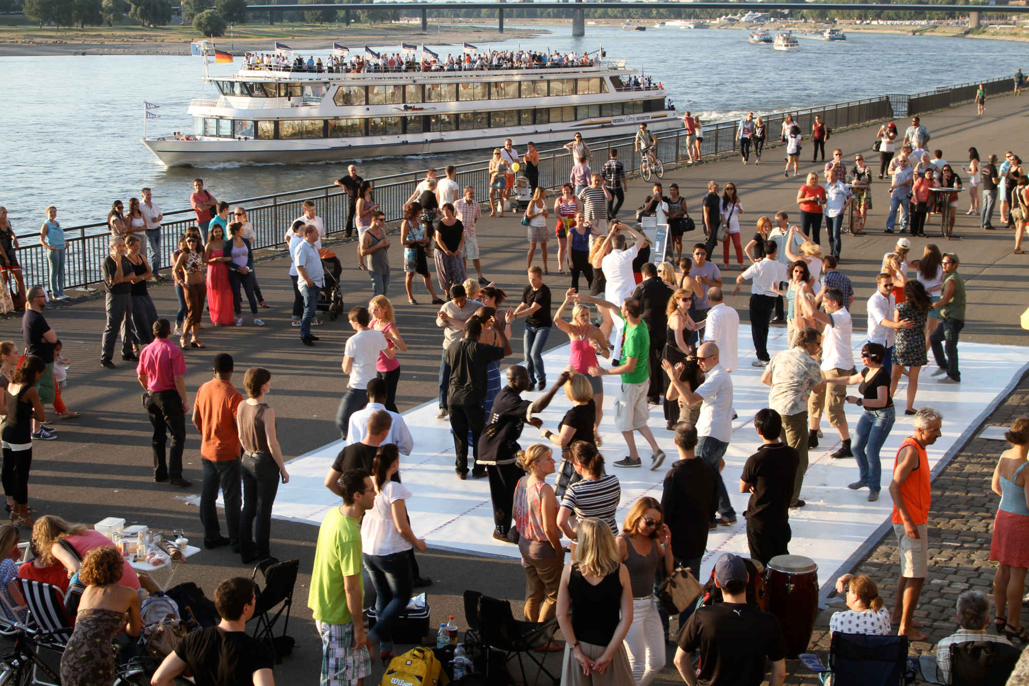 Tanzveranstaltung auf dem Unteren Rheinwerft, Düsseldorf.